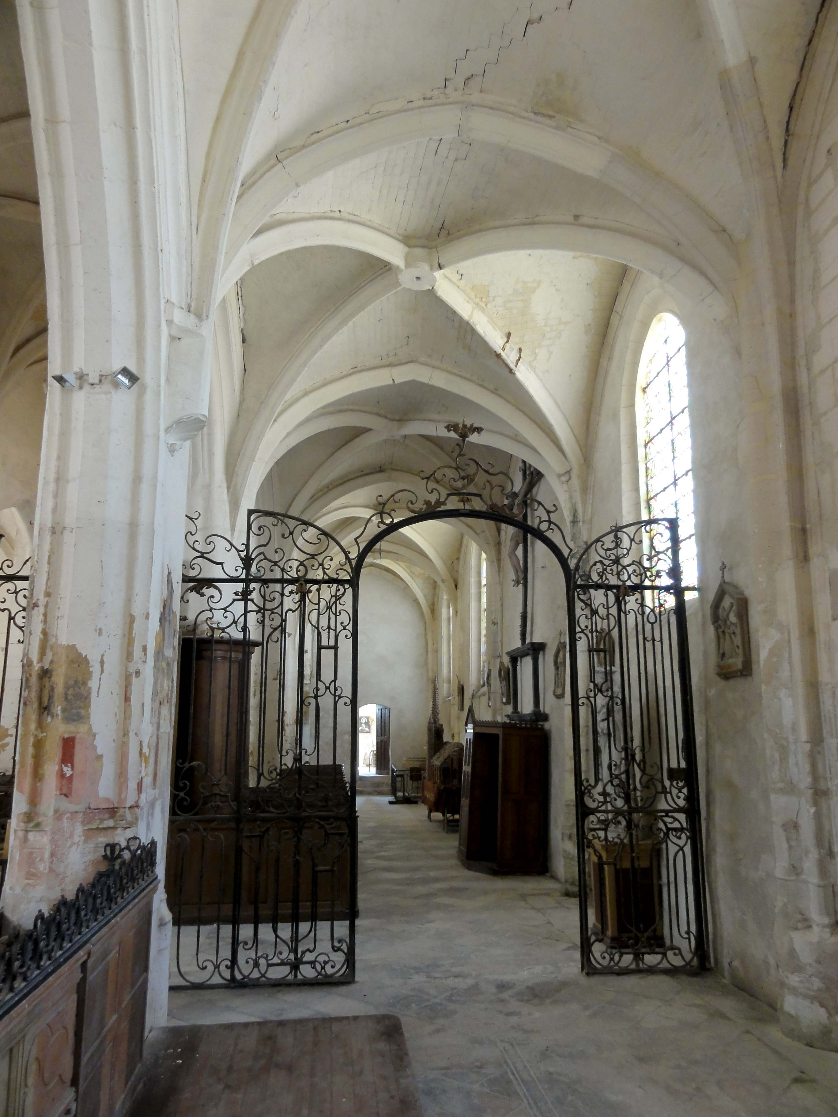 Intérieur de l'église (voir titre).